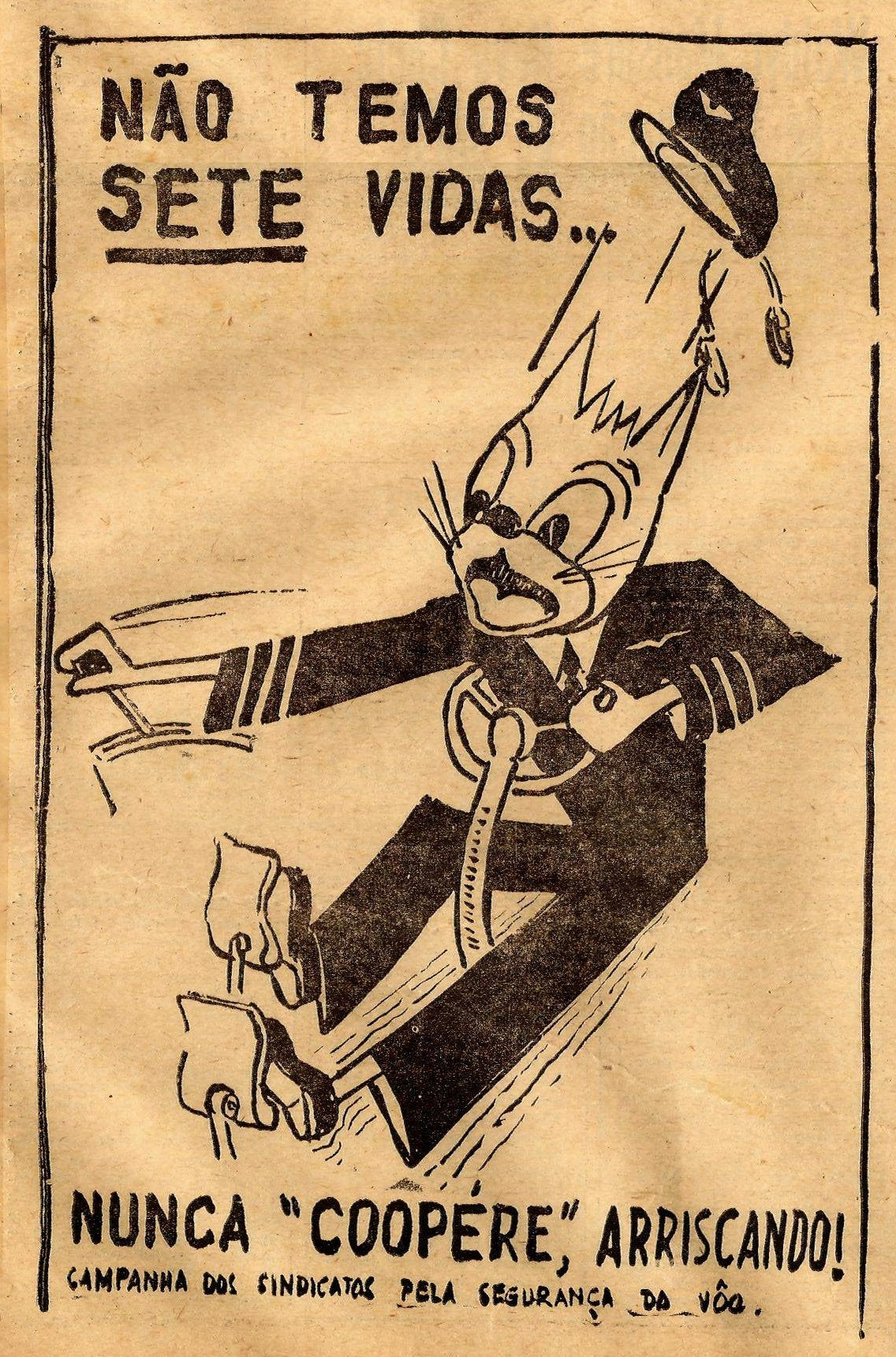 A ilustração encontra-se no jornal "A Bússola" e faz parte da matéria "A fadiga aérea e a segurança de voo", tema importante para os trabalhadores da aviação e para a sociedade. A matéria é de agosto de 1960.